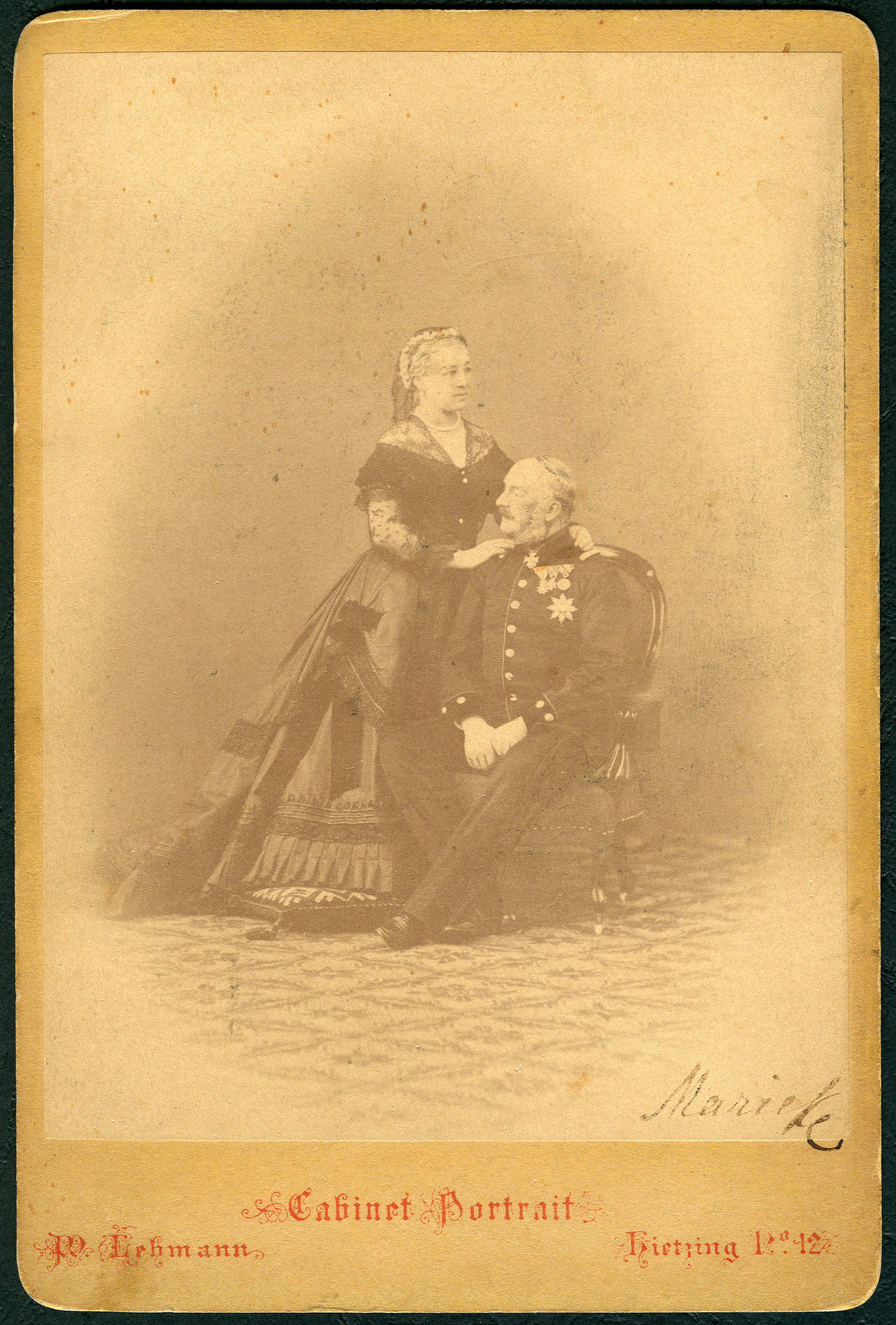 Das nach der Schlacht bei Langensalze 1866 aus dem Königreich Hannover zunächst nach Hietzing/Österreich exilierte Ehepaar Marie und Georg V., hier auf einer von Marie signierten Atelieraufnahme des Fotografen Wilhelm Lehmann, der sein Fotostudio „neben Dommayers Casino“ (vergleiche die Rückseite (Revers) des Kartonträgers im Kabinettformat) betrieb. In der Vergrößerung dieses um 1867 entstandenen Fotos ist die nachträgliche Retuschierung der Augen der Königin zu erkennen ...